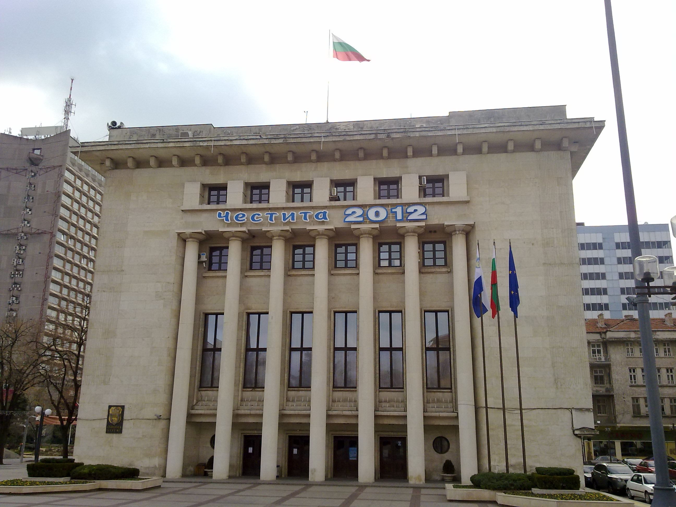 Burgas, Bulgarien: Rathaus in Aleksandrovska Straße - Hauptfußgängerzone